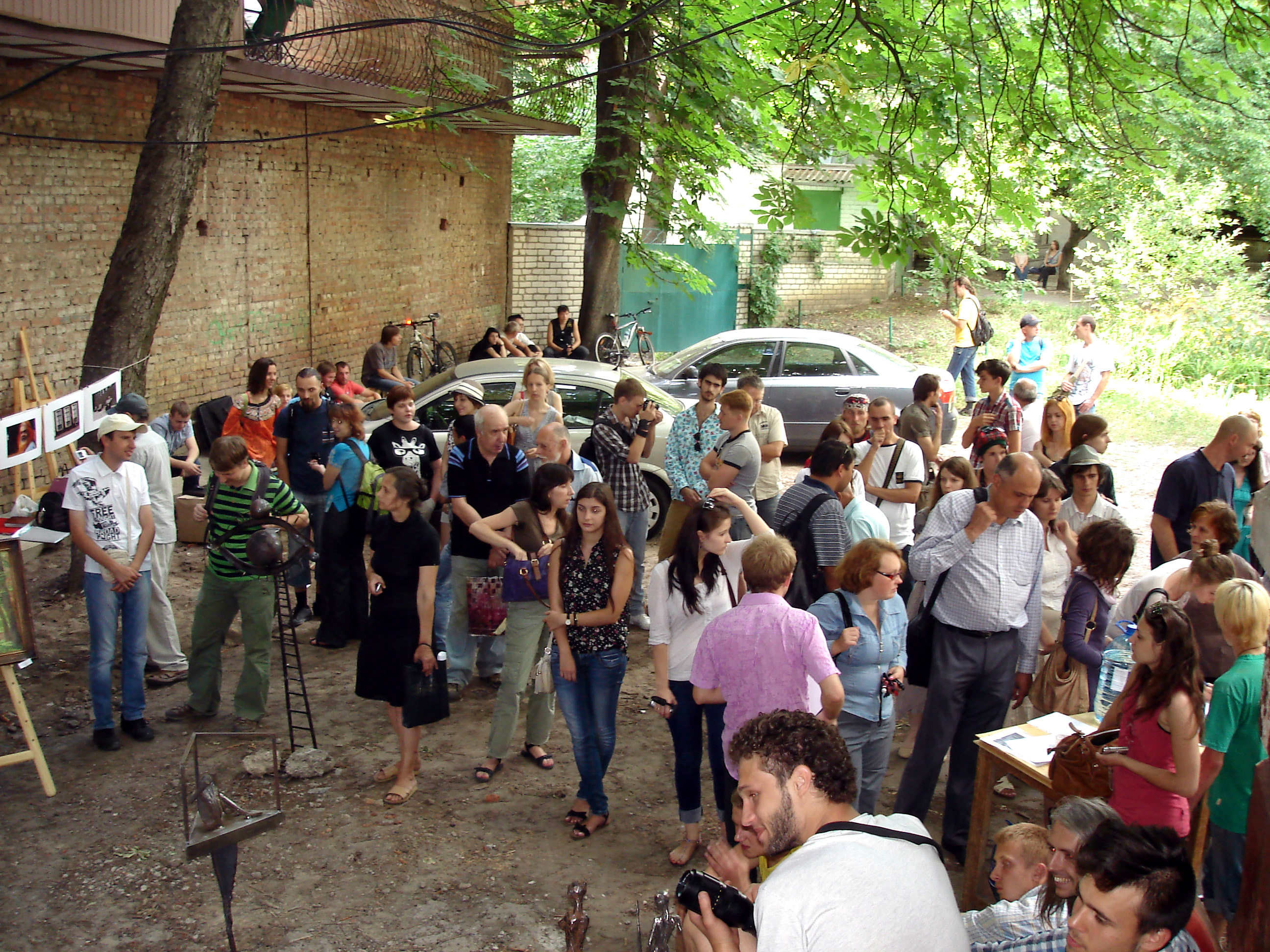 Акція естетичного спротиву «Шаляпін Forever» на захист будинку Сурукчі, що належав харківському лікарю-оториноларингологу Степану Гавриловичу Сурукчі. В ньому проходили творчі вечори, в яких брали участь відомі митці, зокрема, Федір Шаляпін та Олександр Вертинський біля цього будинку. м. Харків, 21 червеня 2013 року.Учасники та слухачі акції.